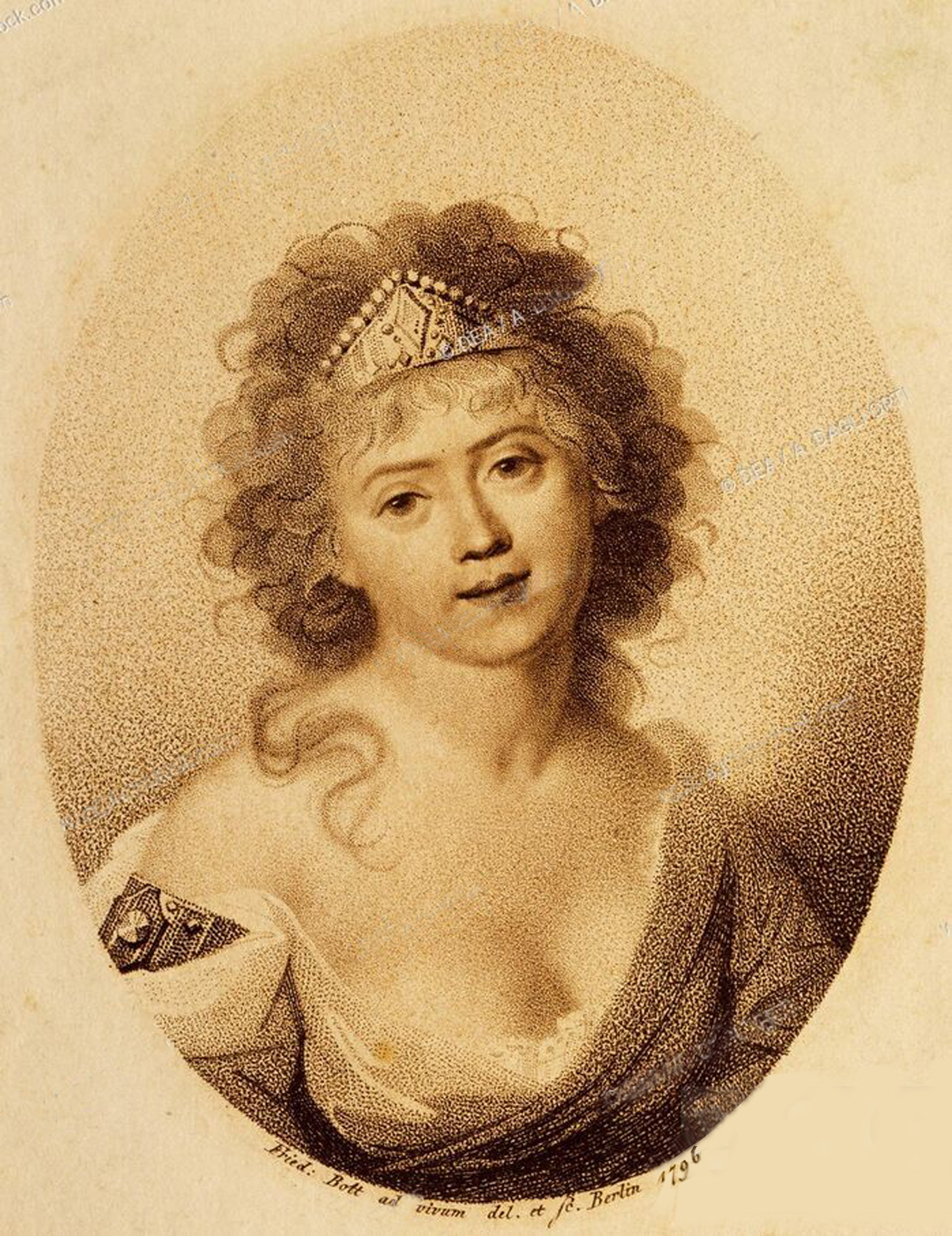 Portrait von Henriette Baranius (1768-1853)